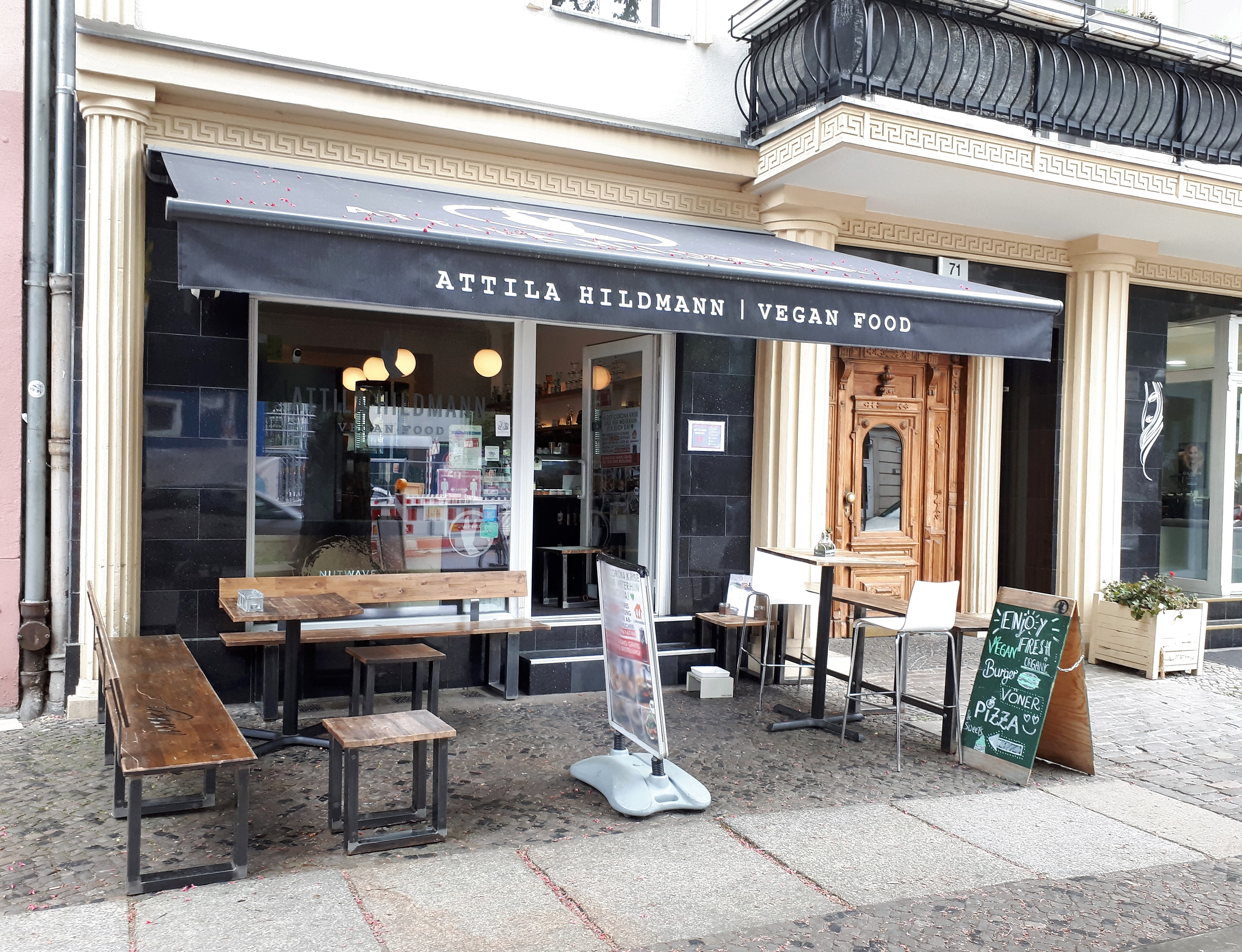 Charlottenburg Schillerstraße Vegan Food von Attila Hildmann